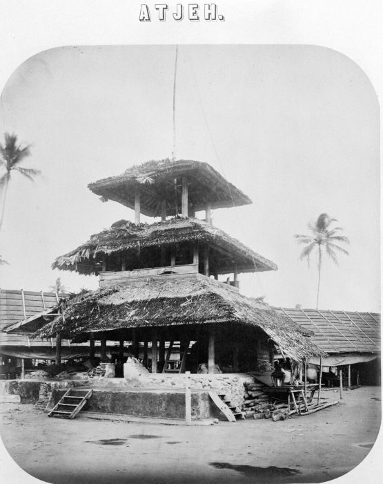 Foto. De vernielde moskee in het fort Lambadak in Atjeh